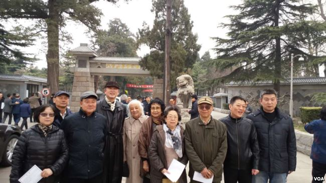 中文（中国大陆）: 2017年3月17日，历史学者章立凡(左4)、作家老鬼(右3)等体制外人士参加胡耀邦夫人李昭告别仪式。